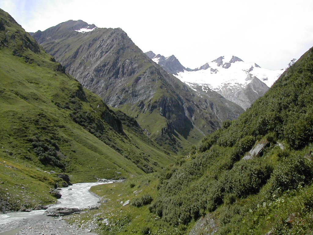 Umbaltal